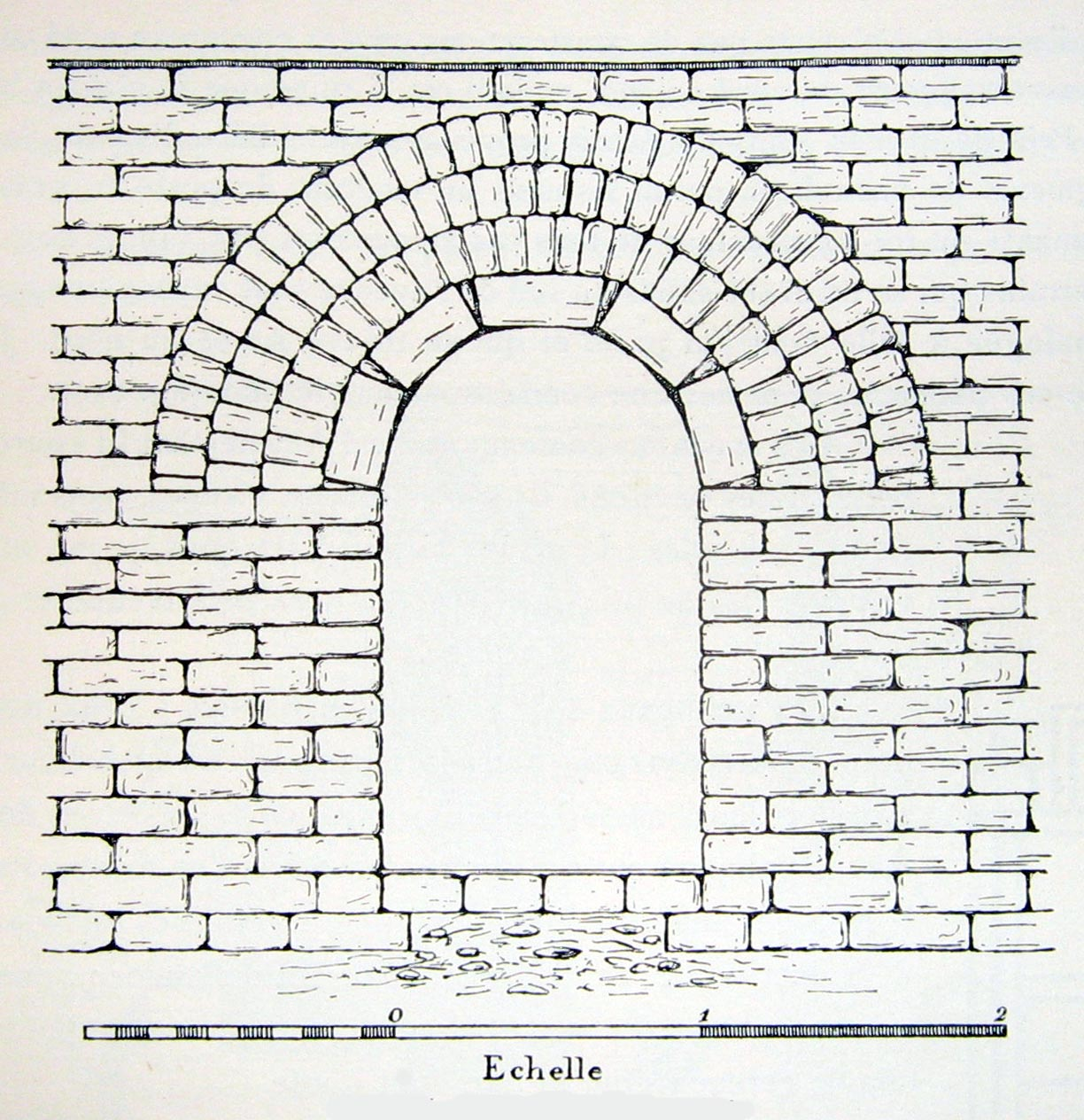 Couloir voûté de la pyramide d'Amenemhat III à Dahchour